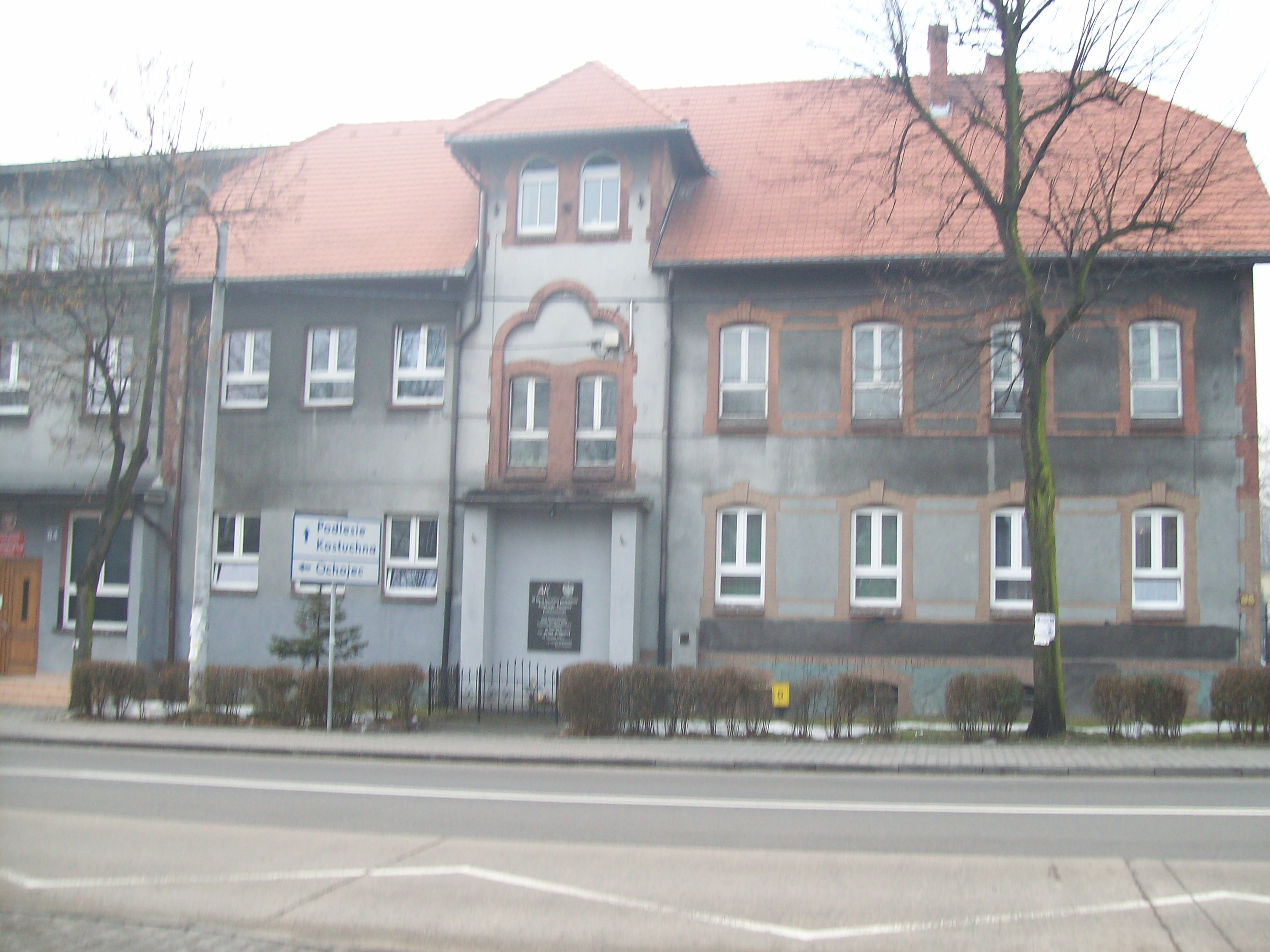 Budynek Zespołu Szkół Poligraficzno-Mechanicznych im. Armii Krajowej (ul. Armii Krajowej, Katowice-Piotrowice)